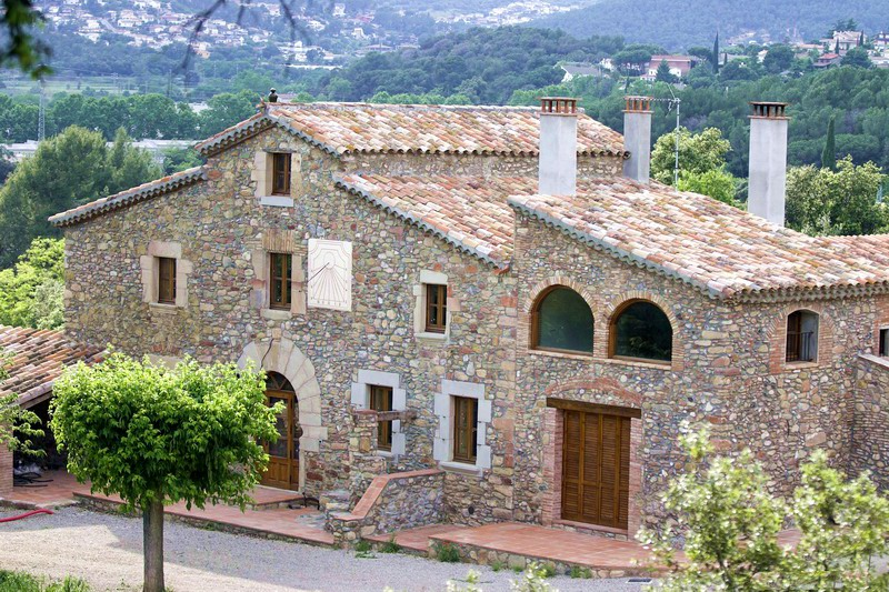 Masia de Mas_fabregas_del_bosc a l'Ametlla del Vallès (Vallès Oriental-Catalunya)